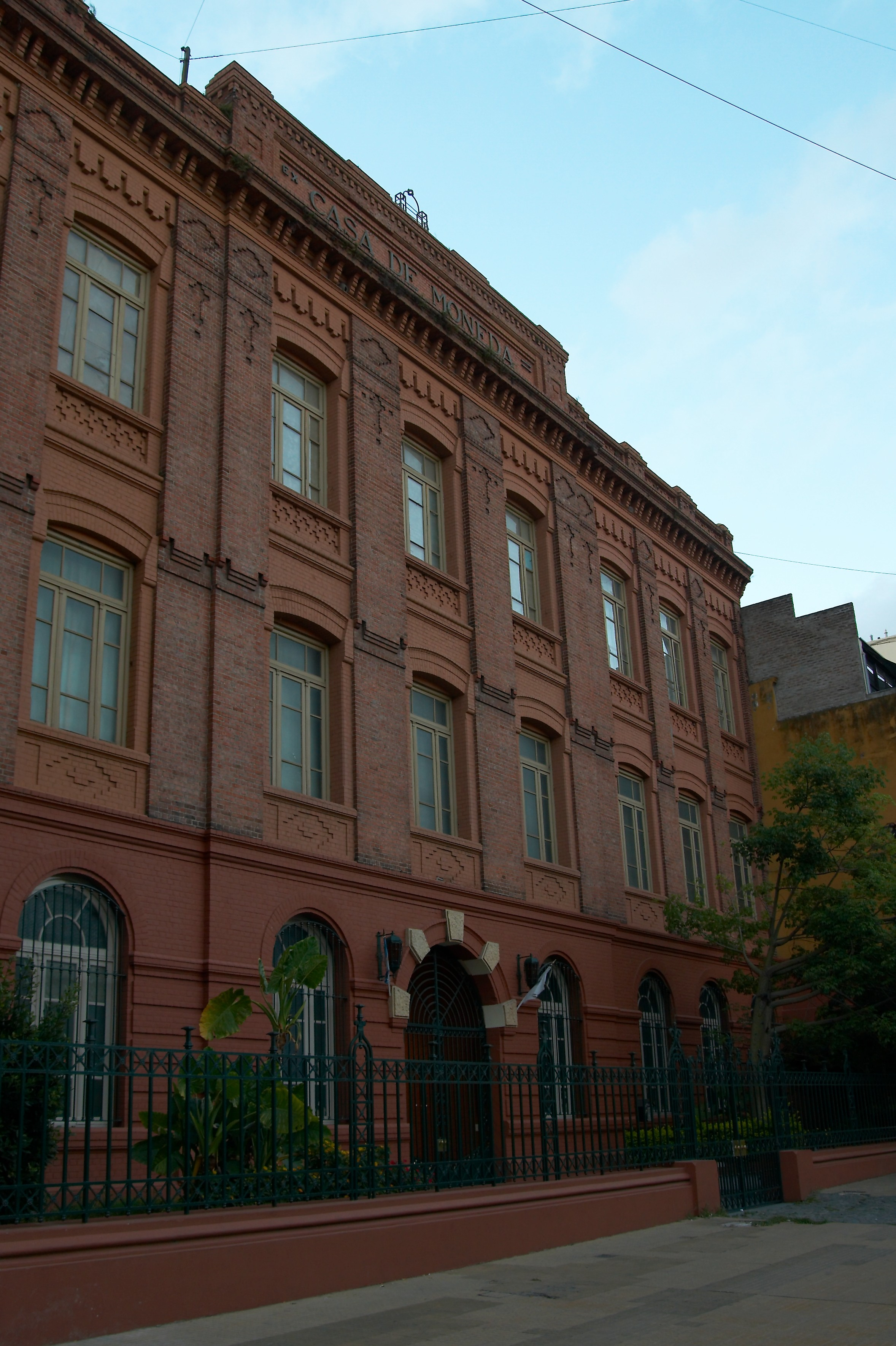 Ex Casa de Moneda, sobre calle Balcarce, barrio de Monserrat, Buenos Aires, Argentina.